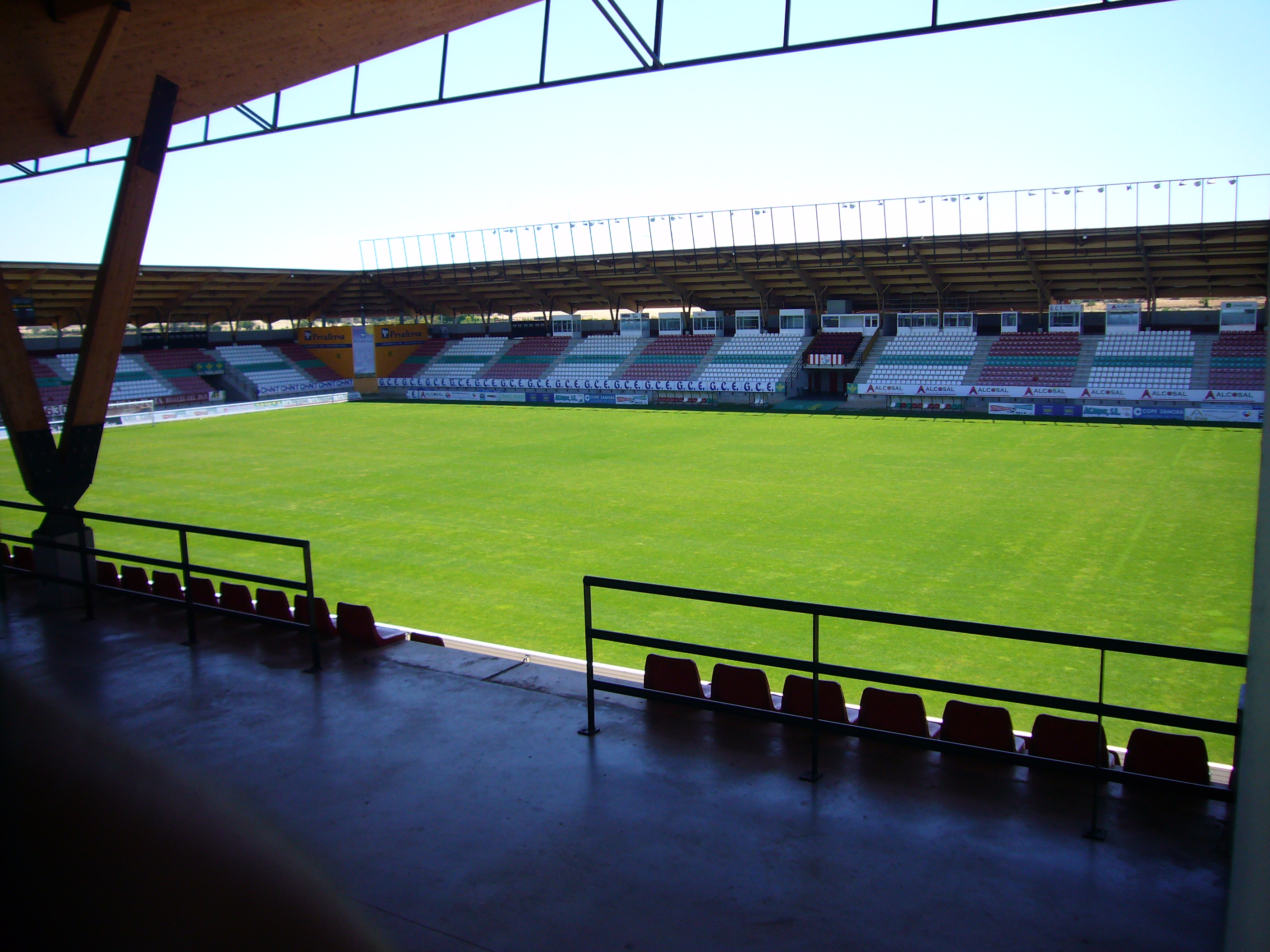 Vista interior del Estadio Municipal Ruta de la Plata en Zamora (España).